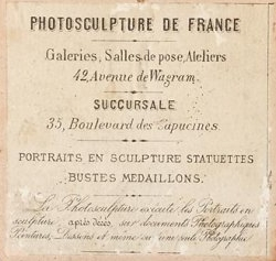 Adresse de l'entreprise de photosculpture de François Willème à Paris, années 1860.